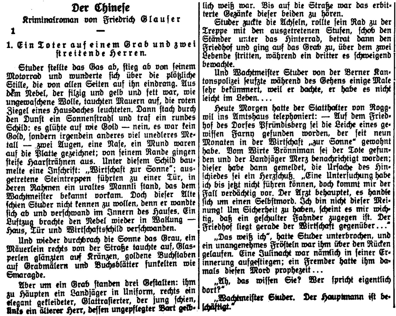 Erstruck "Der Chinese". Ausschnitt aus der "National-Zeitung", Organ für Handel und Industrie. Anzeigeblatt der Stadt Basel, vom 26. Juli 1938